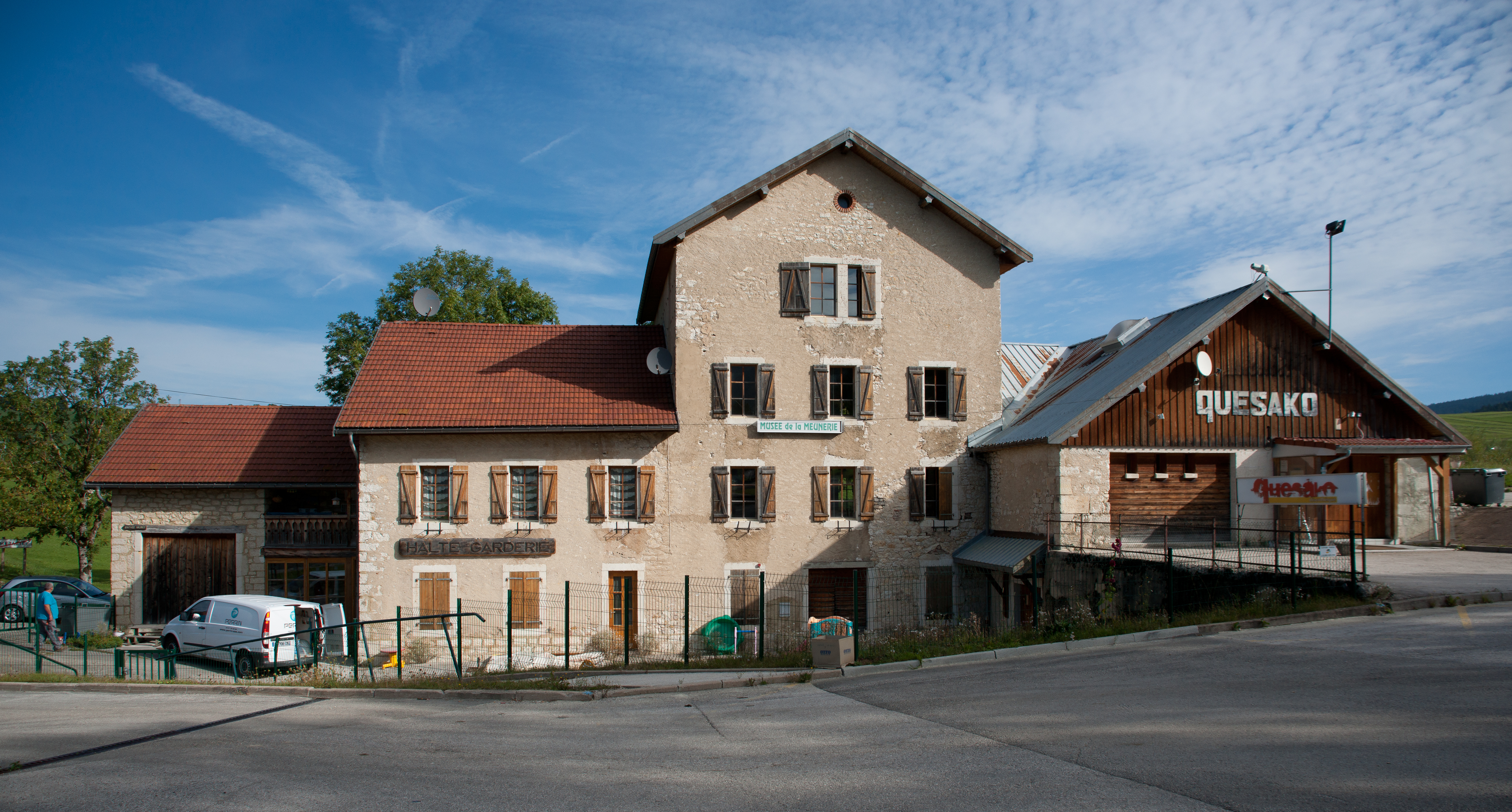 Usine communale de Métabief - bâtiment .